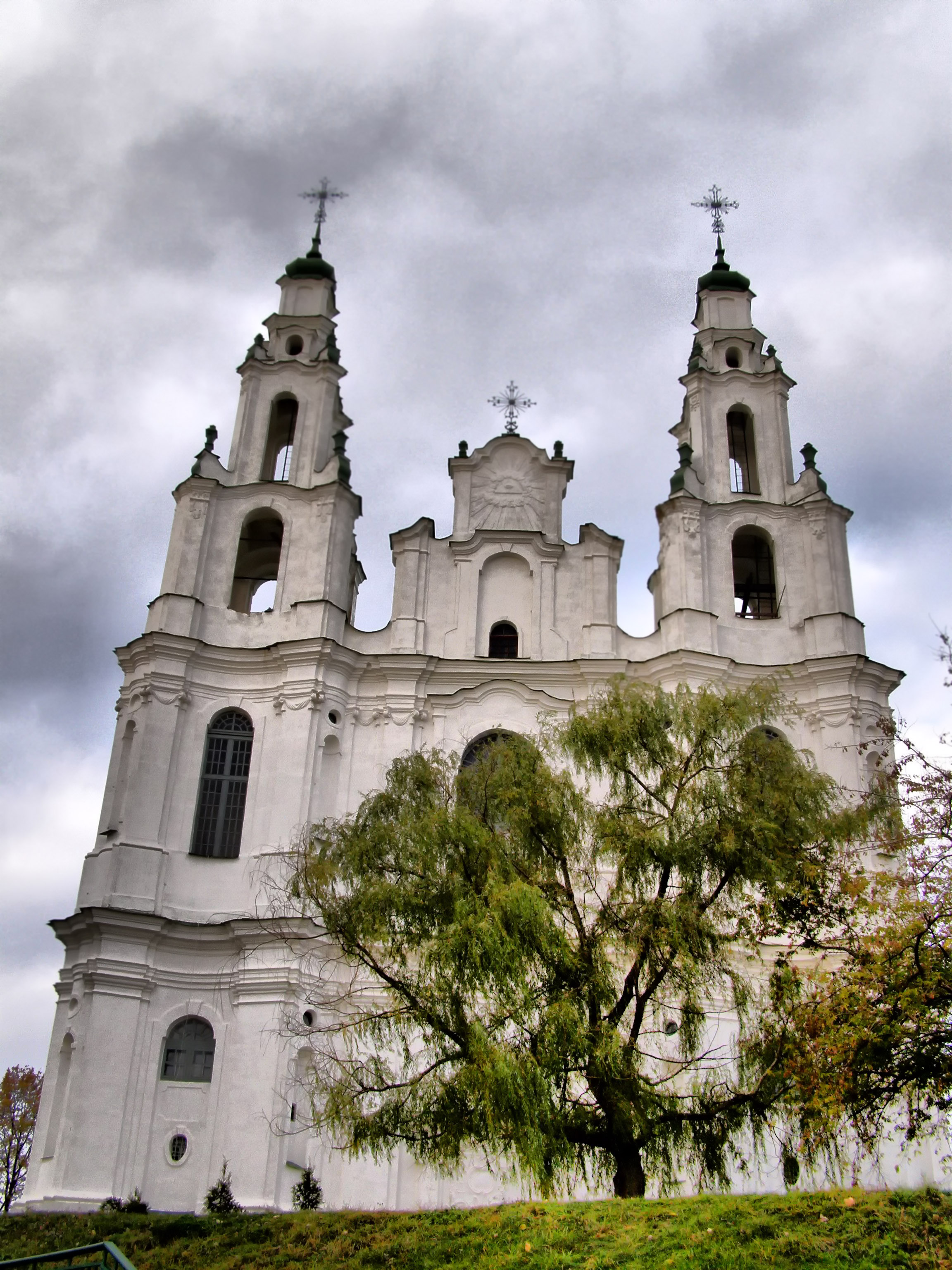 Архитектурное решение полоцкого Софийского собора сходно с одноимёнными храмами Киева и Новгорода. Это был пятинефный крестово-купольный храм с княжескими хорами, с выделенной алтарной частью в центральной апсиде с синтроном, с куполом диаметром 5,85 метра.